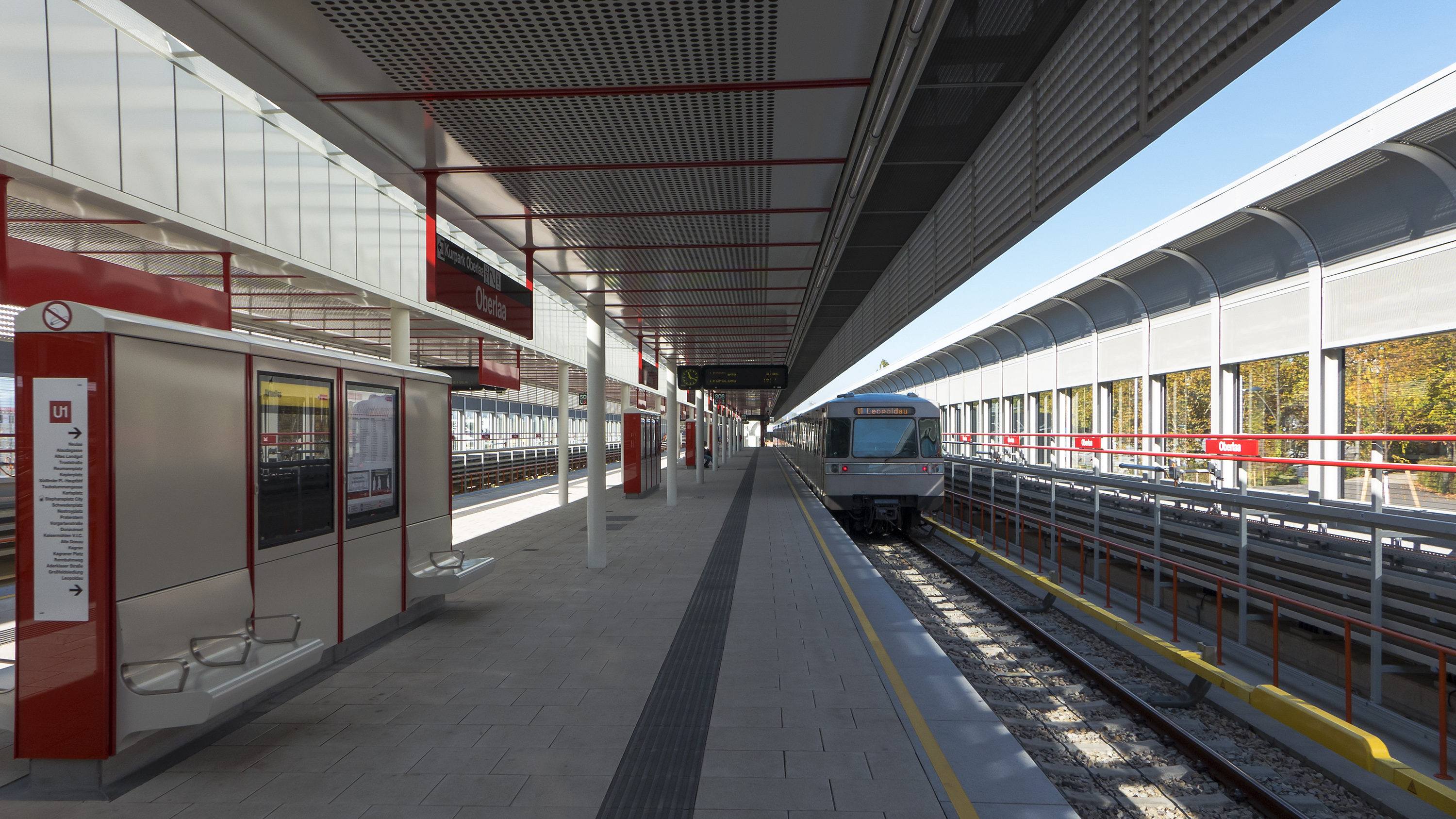 U-Bahn-Station Oberlaa der Linie U1 in Wien 10